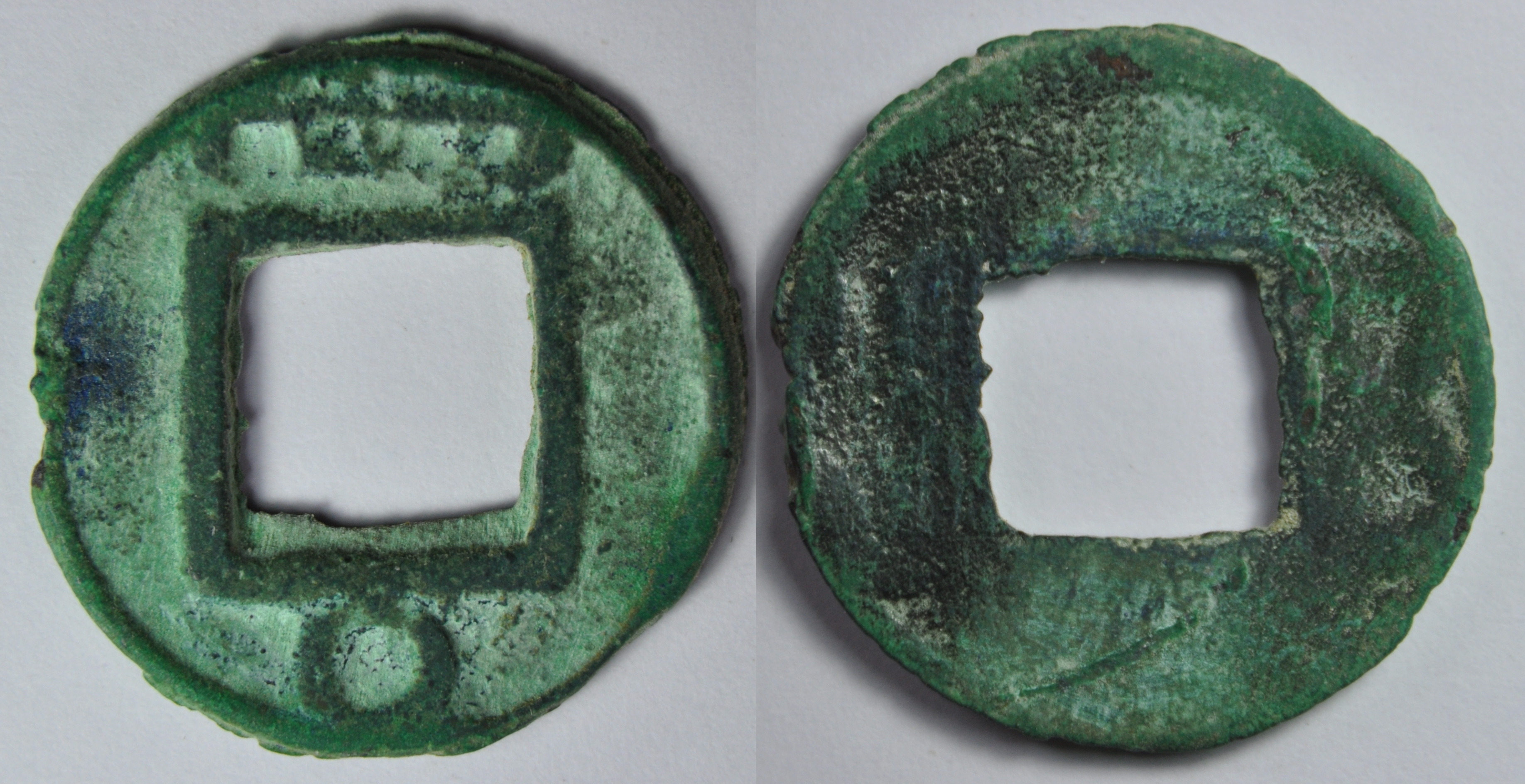 Une sapèque en cuivre du royaume de Koutcha avec une inscription bilingue koutchéen-chinois. A/ inscription en koutchéen (non déchiffrée actuellement) R/ Wuzhu ; rognure d'ongle en bas Trace de tenon de coulée à 9:00. Comment doit-on lire ces monnaies ? Première hypothèse : l'avers est la partie chinoise, le koutchéen étant sur le revers. Dans ce cas, le cercle est en haut. C'est l'hypothèse admise dans le Hartill. H10.48 Deuxième hypothèse : l'inscription koutchéenne est à l'avers et le chinois au revers. C'est la position adoptée par François Thierry dans Monnaies chinoises Tome II. Comment départager ces deux hypothèses ? Il existe des monnaies où les deux inscriptions sont sur la même face, donc l'avers. Pour lire correctement "wuzhu", le cercle doit être placé en bas. Il existe aussi des monnaies où il n'y pas d'inscription chinoise. F. Thierry suggère donc que c'est l'inscription koutchéenne qui a la priorité et doit donc être placée à l'avers, cercle en bas. J'ai suivi cette hypothèse. Comment dater ces monnaies ? Du point de vue typologique, ces monnaies se rapprochent des modules postérieurs aux Han de l'Est, par exemple les Jin où le trou central est assez large. Il existe différents styles graphiques ce qui montre que ces monnaies ont émises sur un temps long. F. Thierry les date du IIIe au VIe siècle. On les trouve principalement sur le territoire du royaume de Koutcha. Dans ce cas, mon exemplaire pourrait dater des IIIe ou IVe siècles.